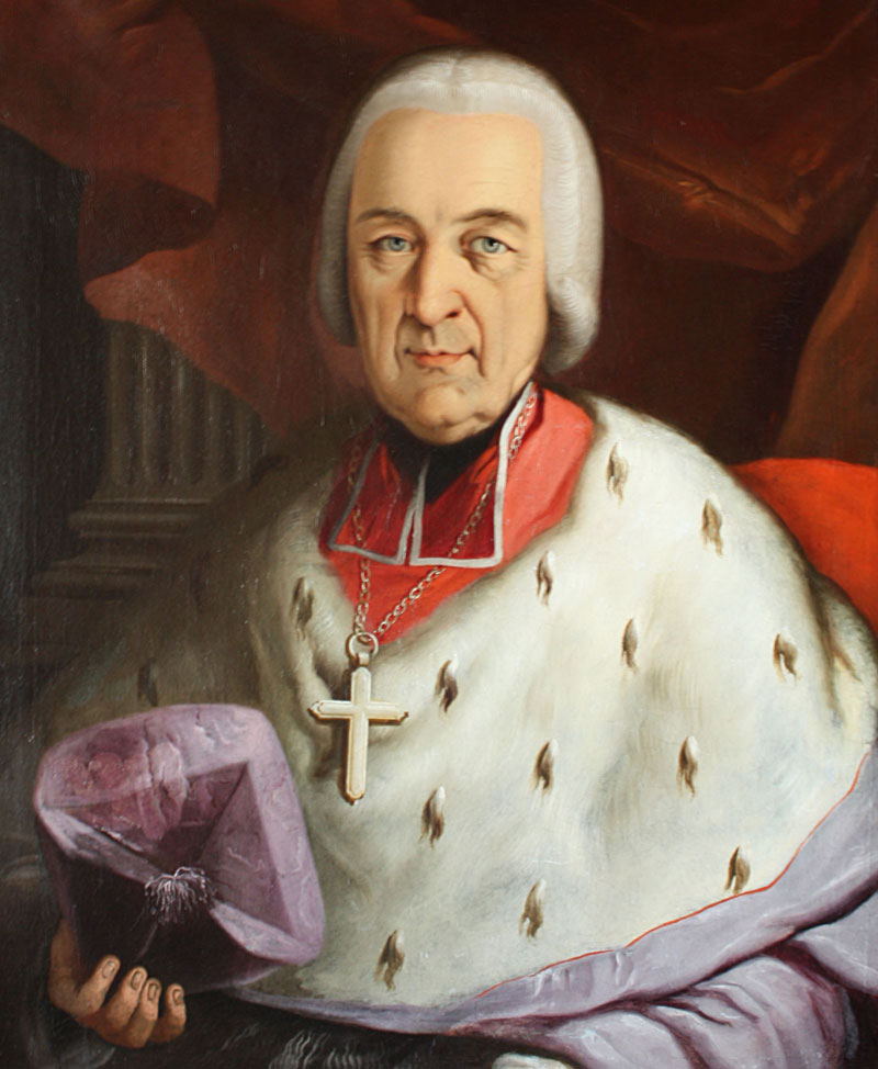 Deitsch: Joseph Philipp Franz Reichsgraf von Spaur / 23.11.1718 in Innsbruck; gest. 26.5.1791 in Brixen. Sohn des Grafen Johann Franz Wilhelm von Spaur und Anna Maximiliane, Gräfin von Trapp. 1741 Priester; 1763 bis 1779 Fürstbischof von Seckau; 1779 bis 1791 Fürstbischof von Brixen.